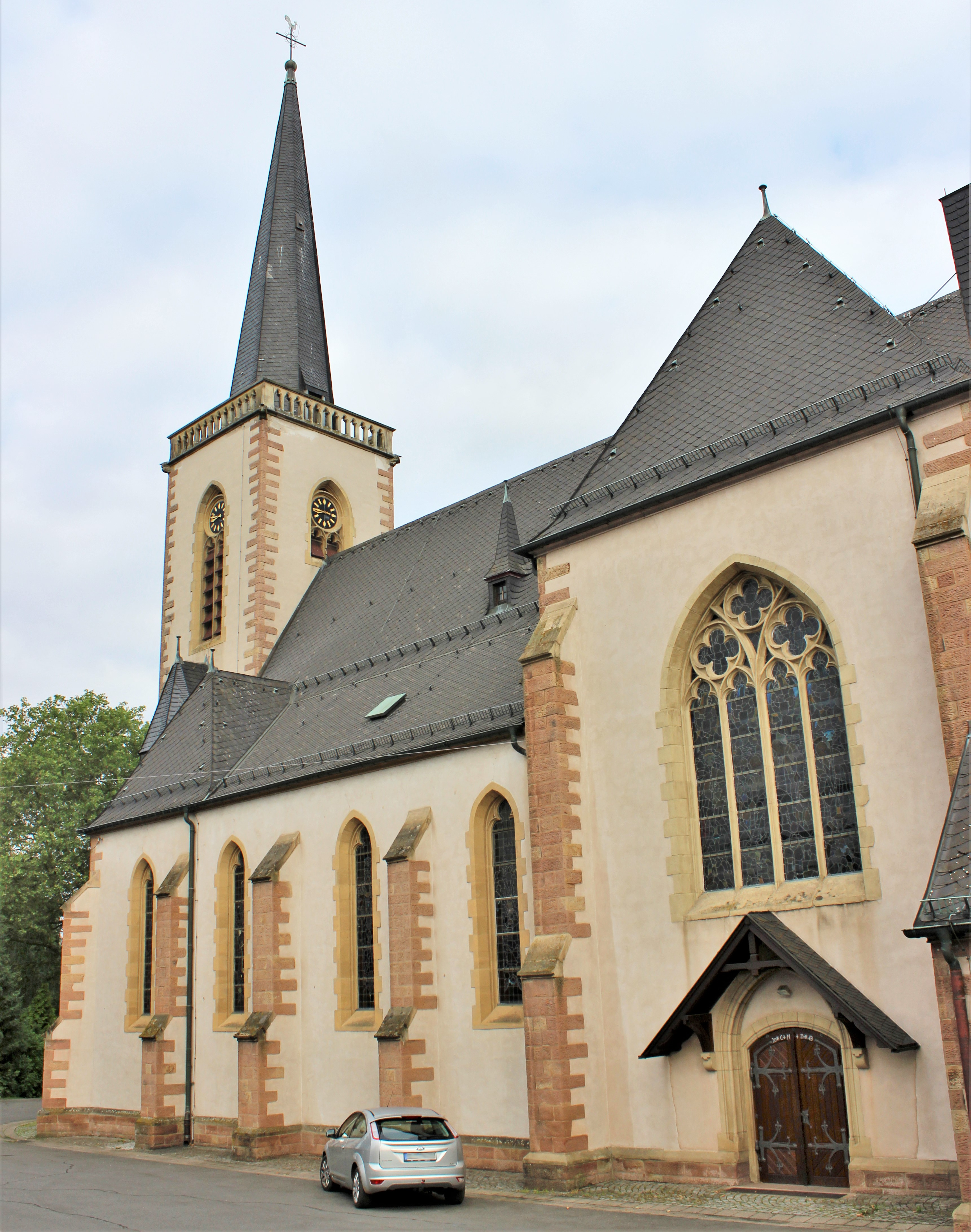 Die katholische Pfarrkirche St. Josef in Elm-Derlen, einem Ortsteil der Gemeinde Schwalbach, Landkreis Saarlouis, Saarland